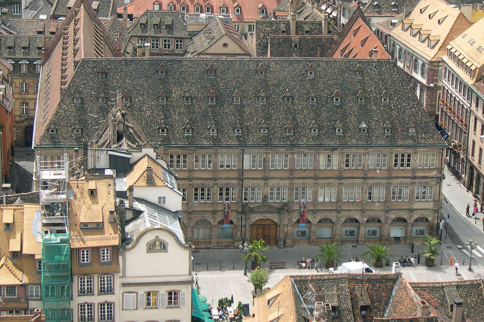 La Chambre de Commerce de Strasbourg vue depuis la cathédrale